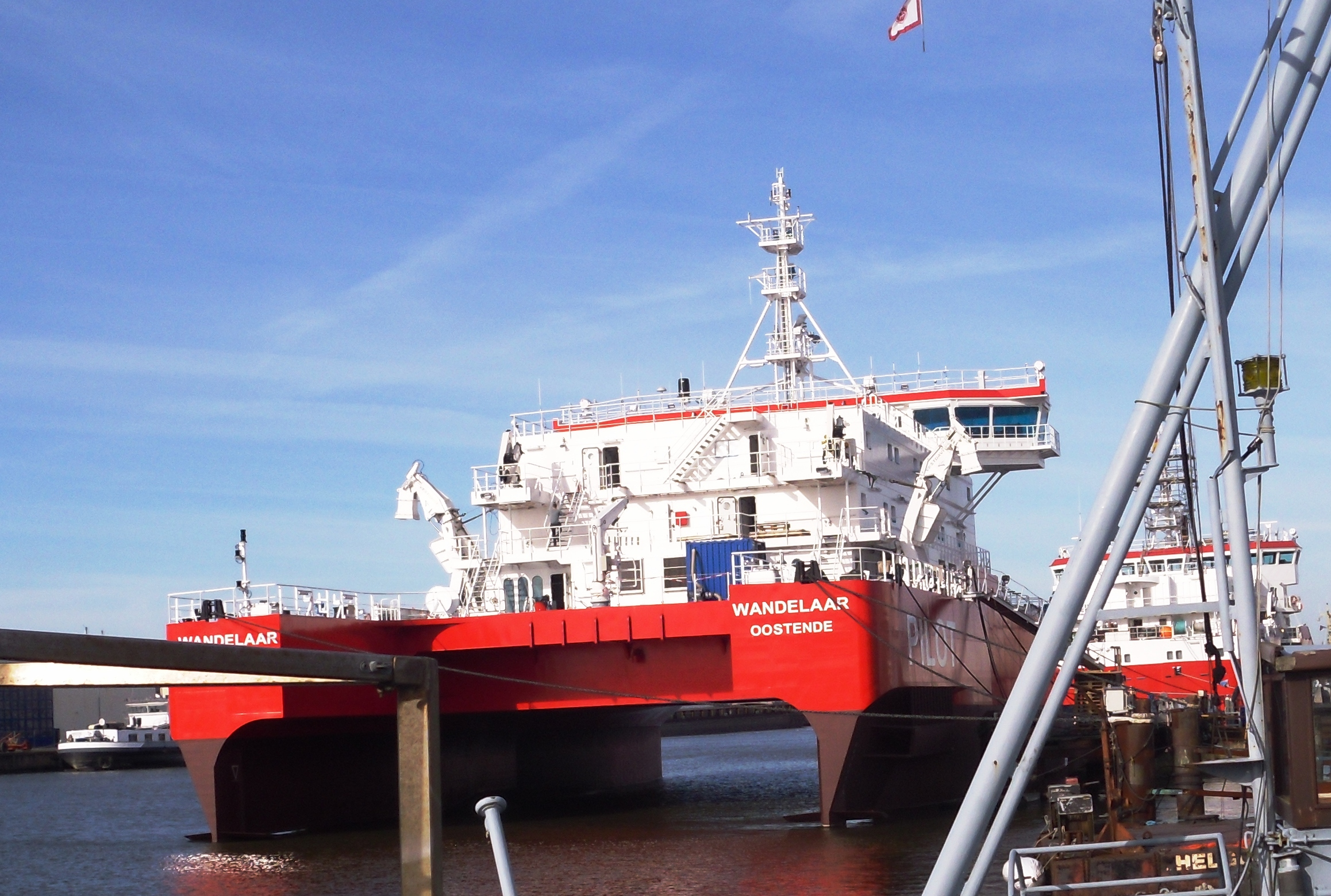 Belgisches Lotsen-Stationsschiff "Wandelaar" nach Swath-Bauart